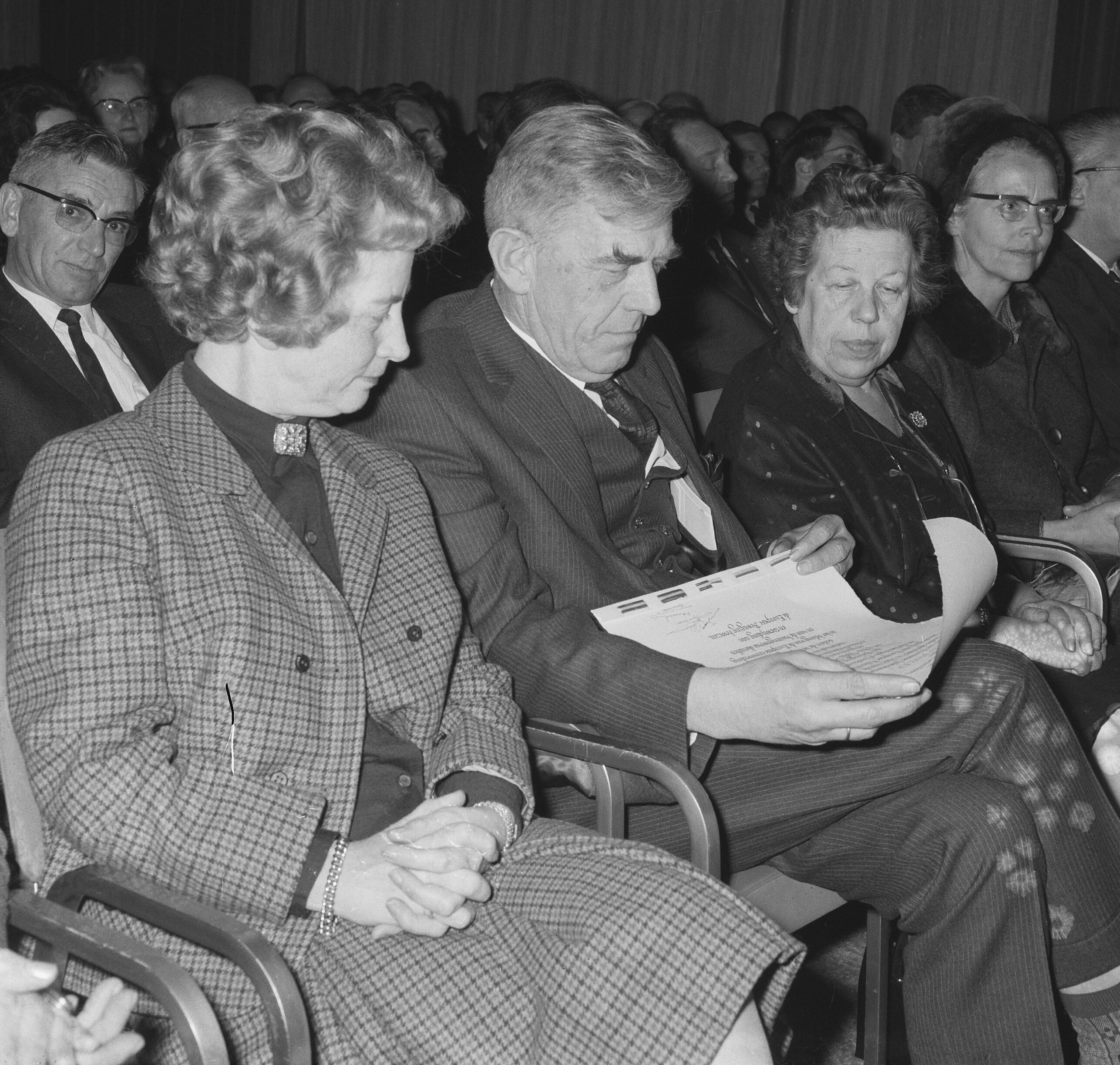 Collectie / Archief : Fotocollectie Anefo Reportage / Serie : Buitengewoon Congres van de Europese Beweging te Rotterdam Beschrijving : Alfred Moser bij zijn benoeming tot erelid van de Europese Beweging Datum : 13 november 1965 Locatie : Rotterdam, Zuid-Holland Trefwoorden : Europese eenwording, conferenties, internationale organisaties Persoonsnaam : Moser, Alfred Fotograaf : Kroon, Ron / Anefo Auteursrechthebbende : Nationaal Archief Materiaalsoort : Negatief (zwart/wit) Nummer archiefinventaris : bekijk toegang 2.24.01.03 Bestanddeelnummer : 918-4431